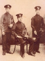 Músicos de la banda de música de Algemesí.